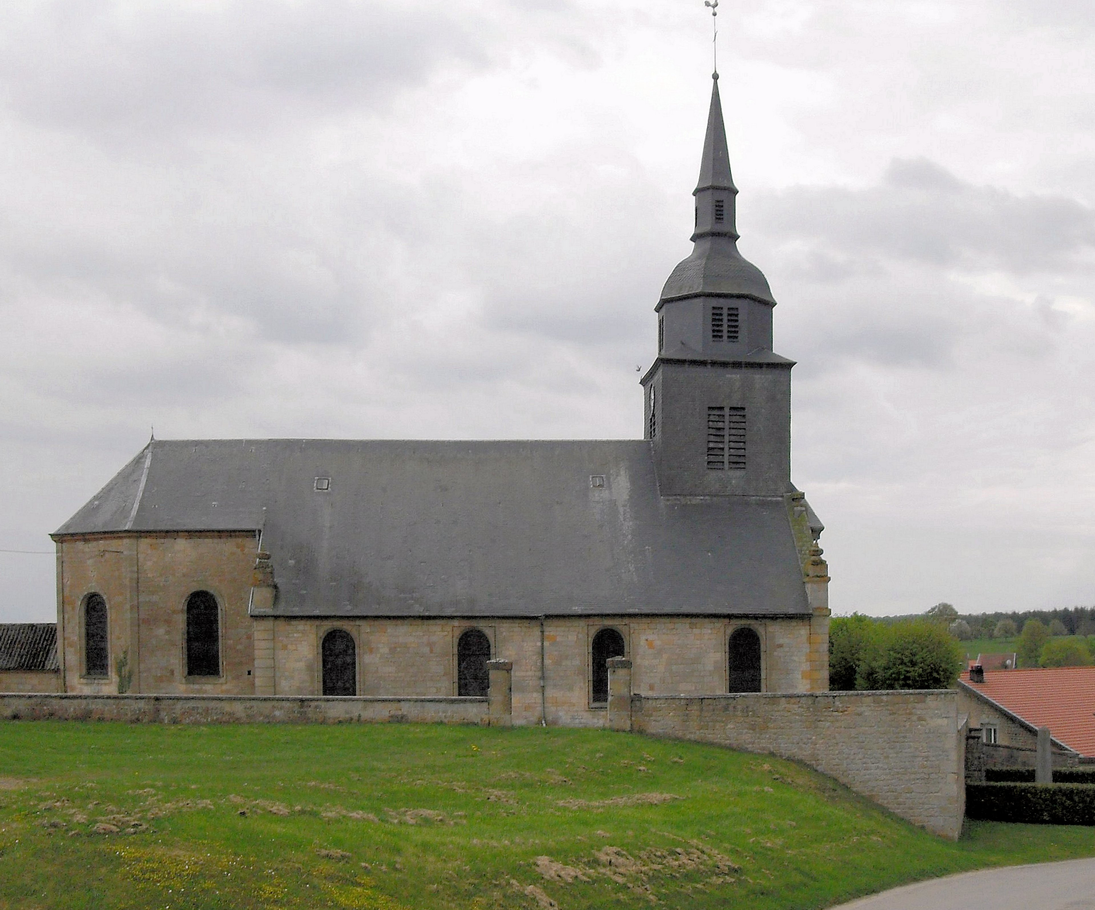 L'église Saint-Blaise à Baâlon